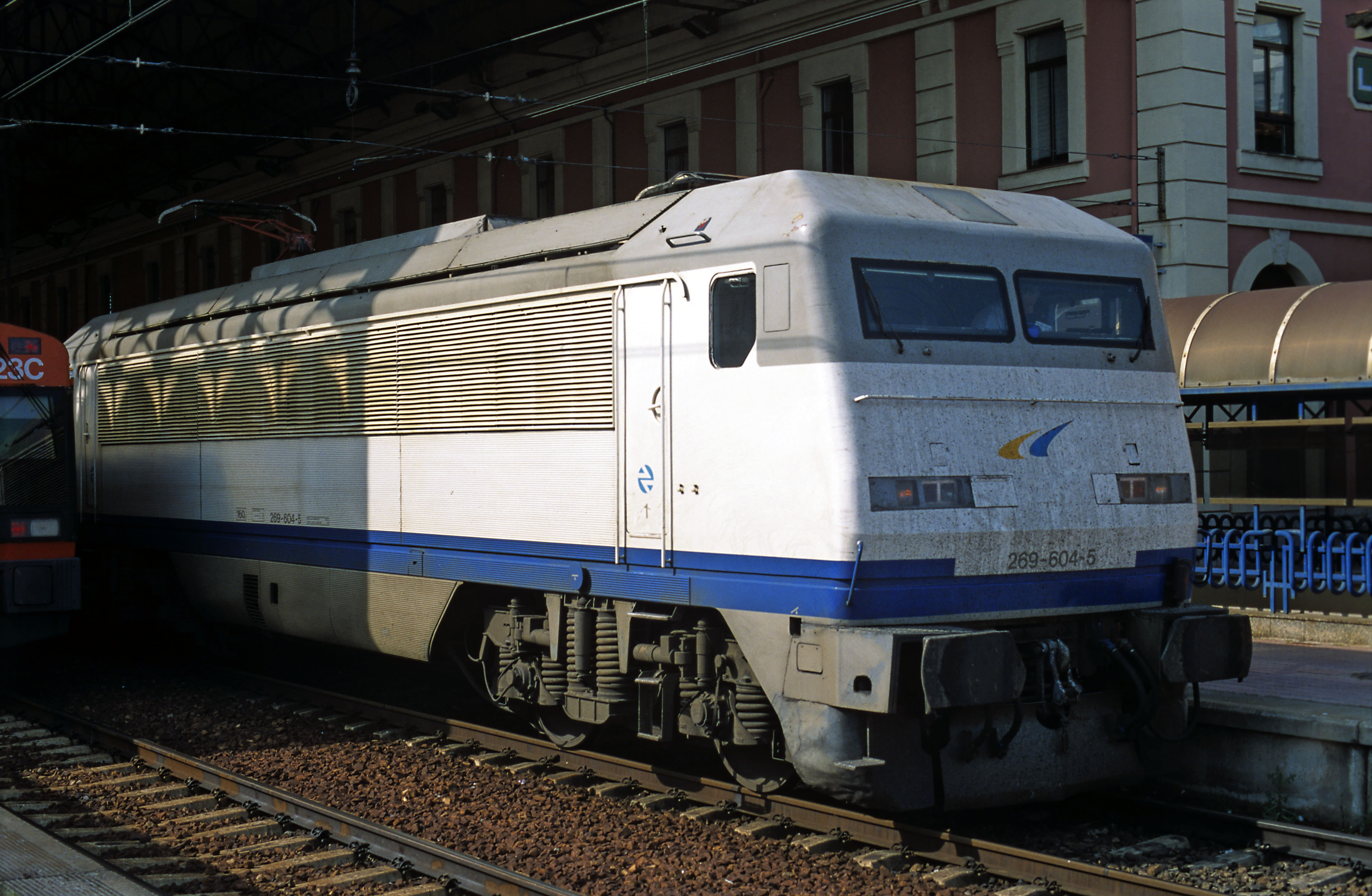 umgebaute 269 mit Talgo Pendular nach Madrid. Nur diese eine von vier Maschinen der Reihe 269.4 mit Schnellfahrdrehgestellen für 200km/h, genannt »Gato montés«, erhielt auch einen neuen Wagenkasten.